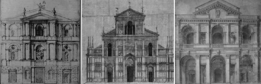 Io non posseggo queste immagini, ma sono tratte dai testi citati in bibliografia. La classe ha preso le immagini e le ha assemblate. Nessuna di queste è a scopo di lucro ma finalizzata alla mera comprensione del testo.